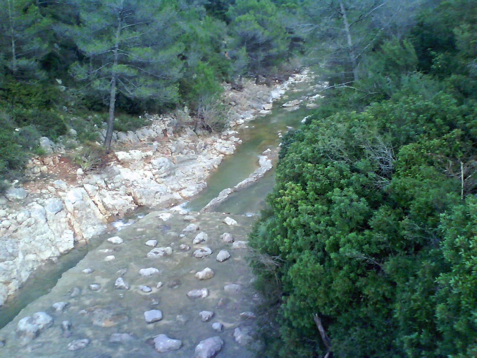 El riu Gorgos portant aigua en la tardor.